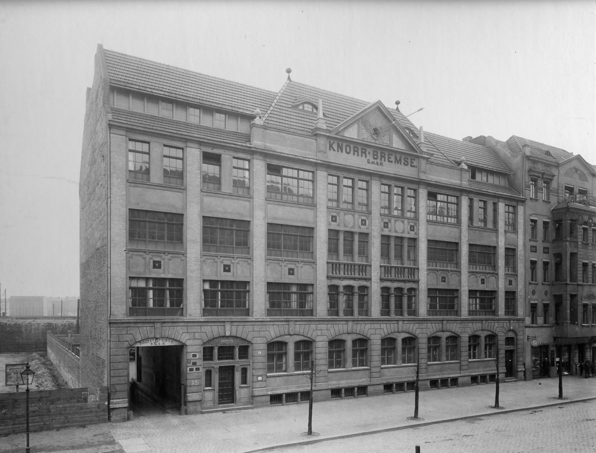 Fabrikgebäude der Knorr-Bremse GmbH, Neue Bahnhofstraße 11–14 in Boxhagen-Rummelsburg (heute Berlin-Friedrichshain)